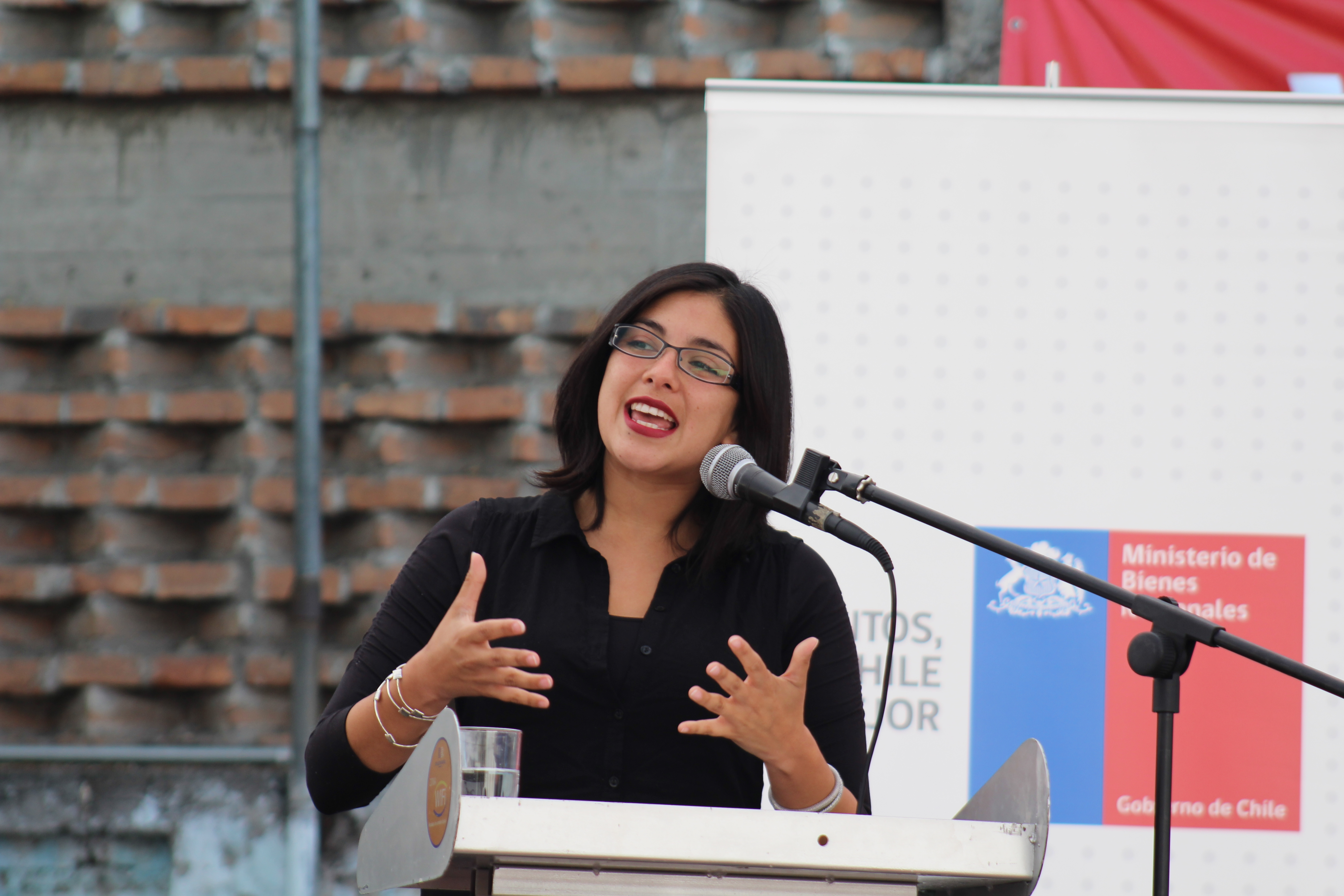 Inauguración de año escolar en Recoleta